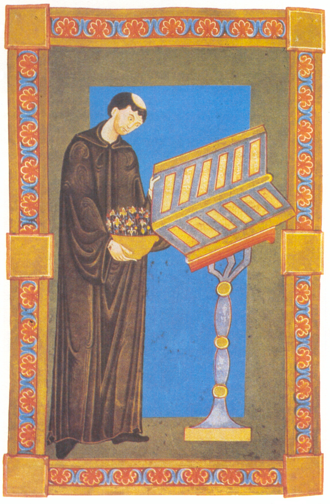 Theofried von Echternach aus Thiofridus Epternacensis: Opera selecta. Pergament. 149 Bl. 28 x 19 cm. Echternach, St. Willibrordkloster. 12. Jh.; Standort: Forschungsbibliothek Gotha